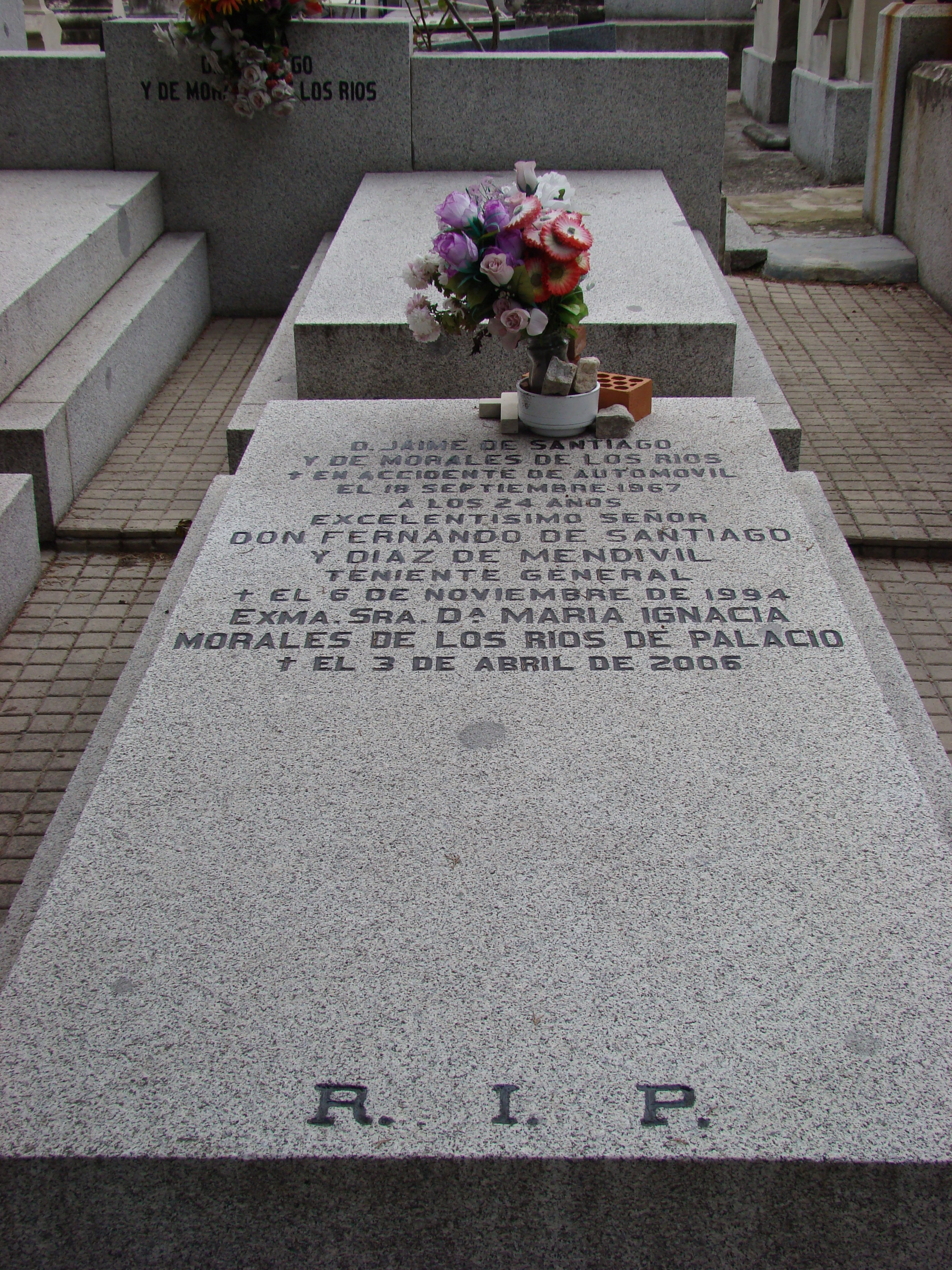 Asumió interinamente la presidencia de gobierno de 1 a 3 de julio de 1976 hasta la toma de posesión de Adolfo Suárez, sucesor de Arias DSC00428